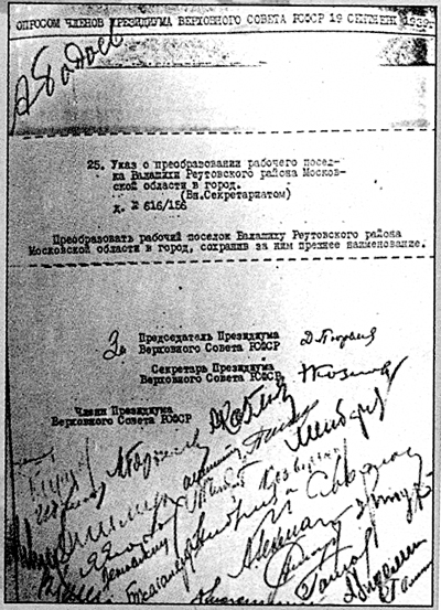 Указ о преобразовании Балашихи в город